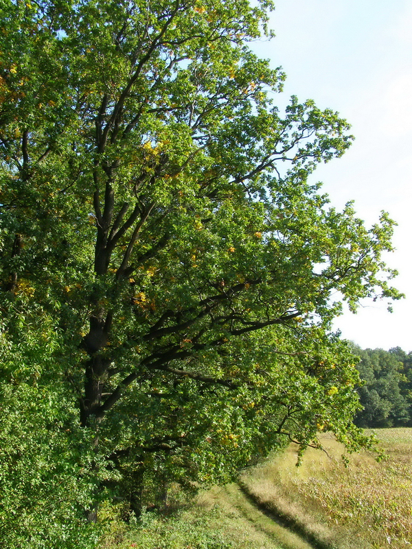 Przykład drzewostanu dębowego na skraju rezerwatu Przylesie